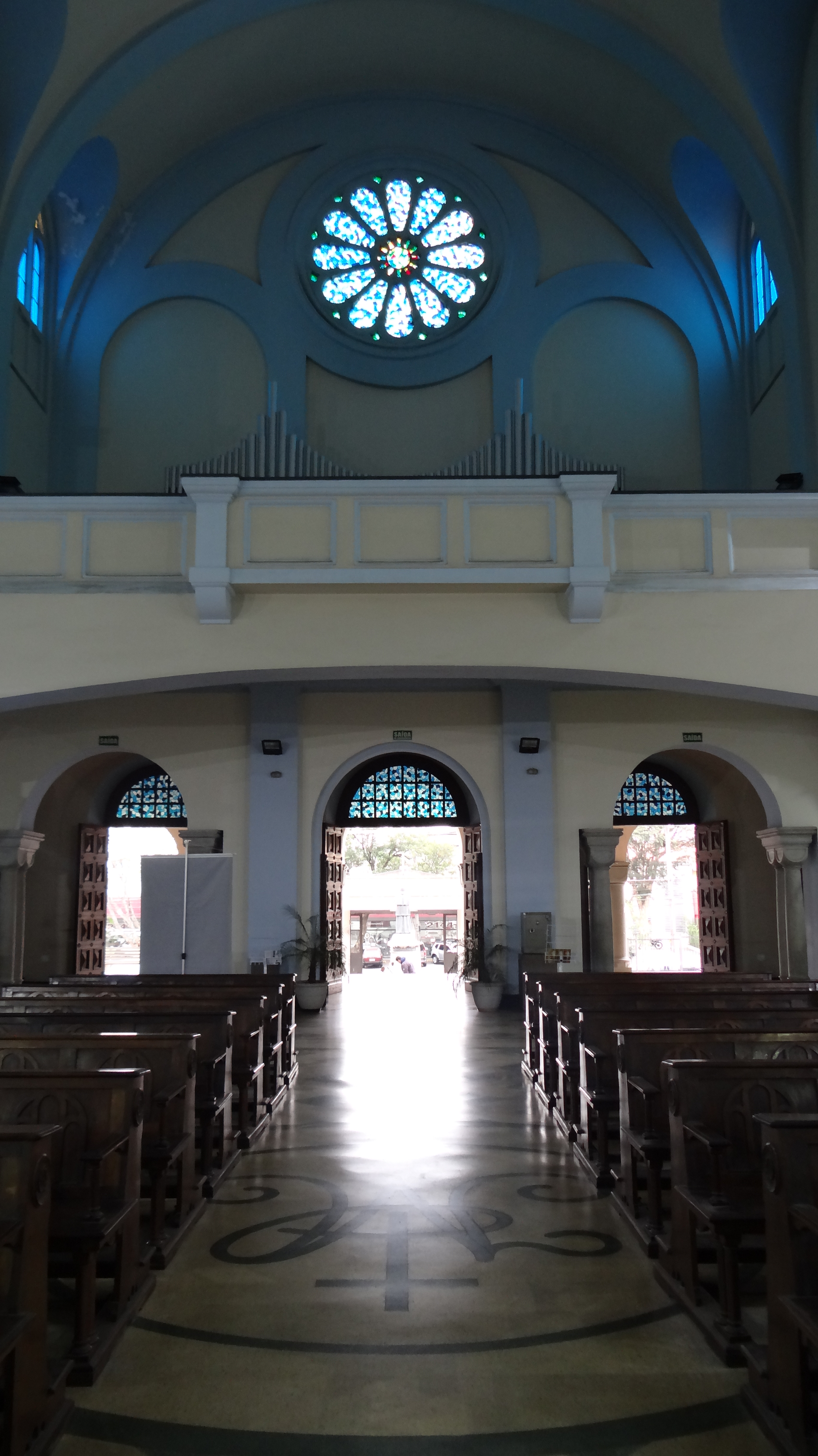 Corredor principal e porta de entrada da Paróquia Iamculada Conceição no Seminário Central do Ipiranga, São Paulo (SP), Brasil.